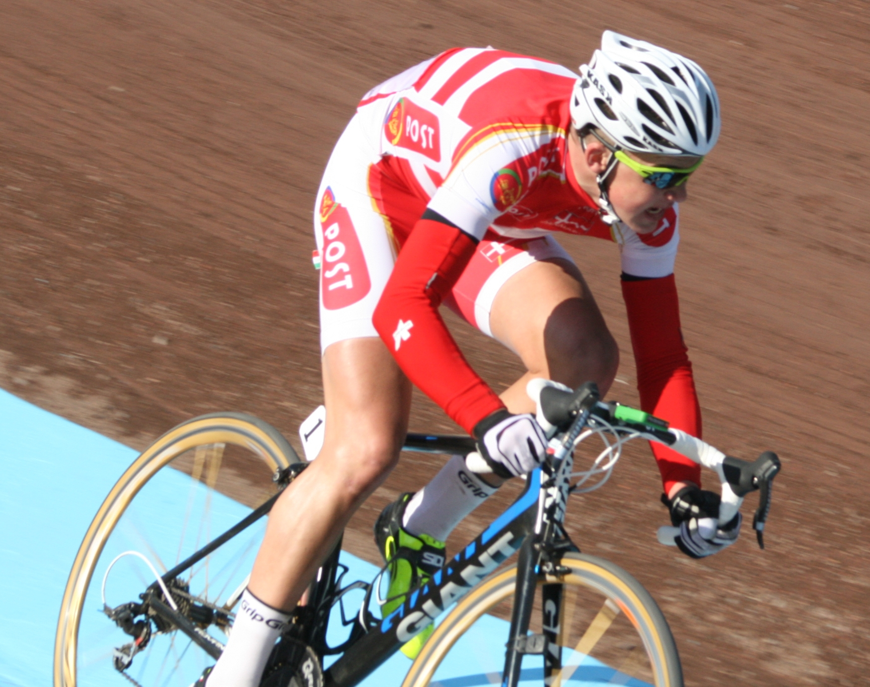 Paris-Roubaix junior 2013, vélodrome de Roubaix Mads Pedersen à l'arrivée